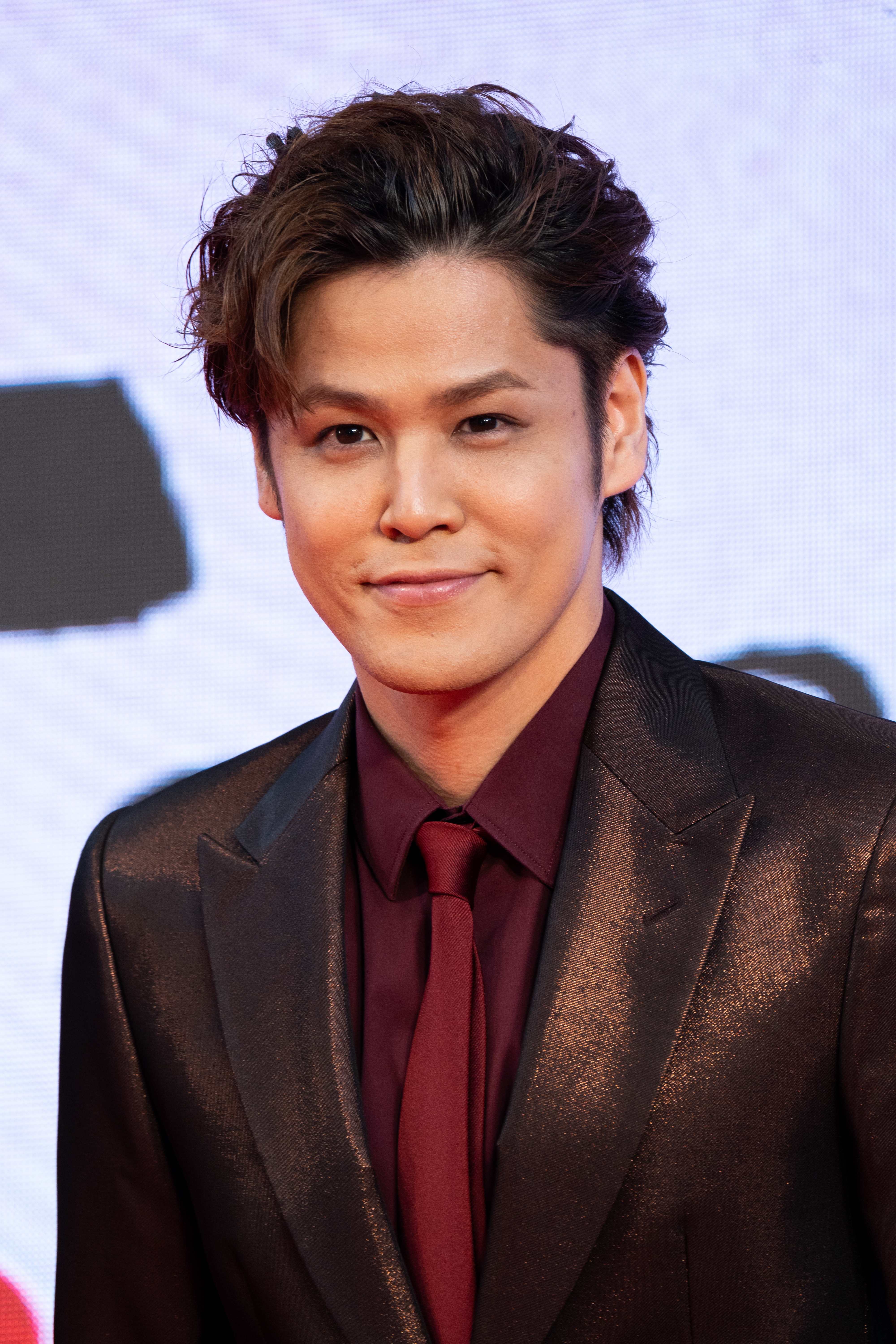 第32回 東京国際映画祭 オープニングセレモニー 宮野真守 (HUMAN LOST 人間失格)